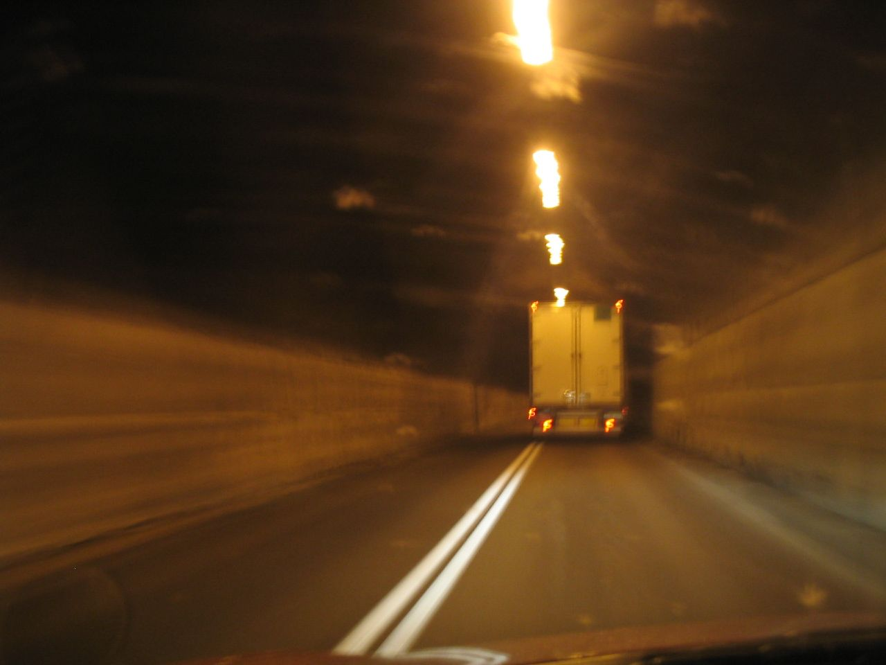 Tunel de Vielha 2005